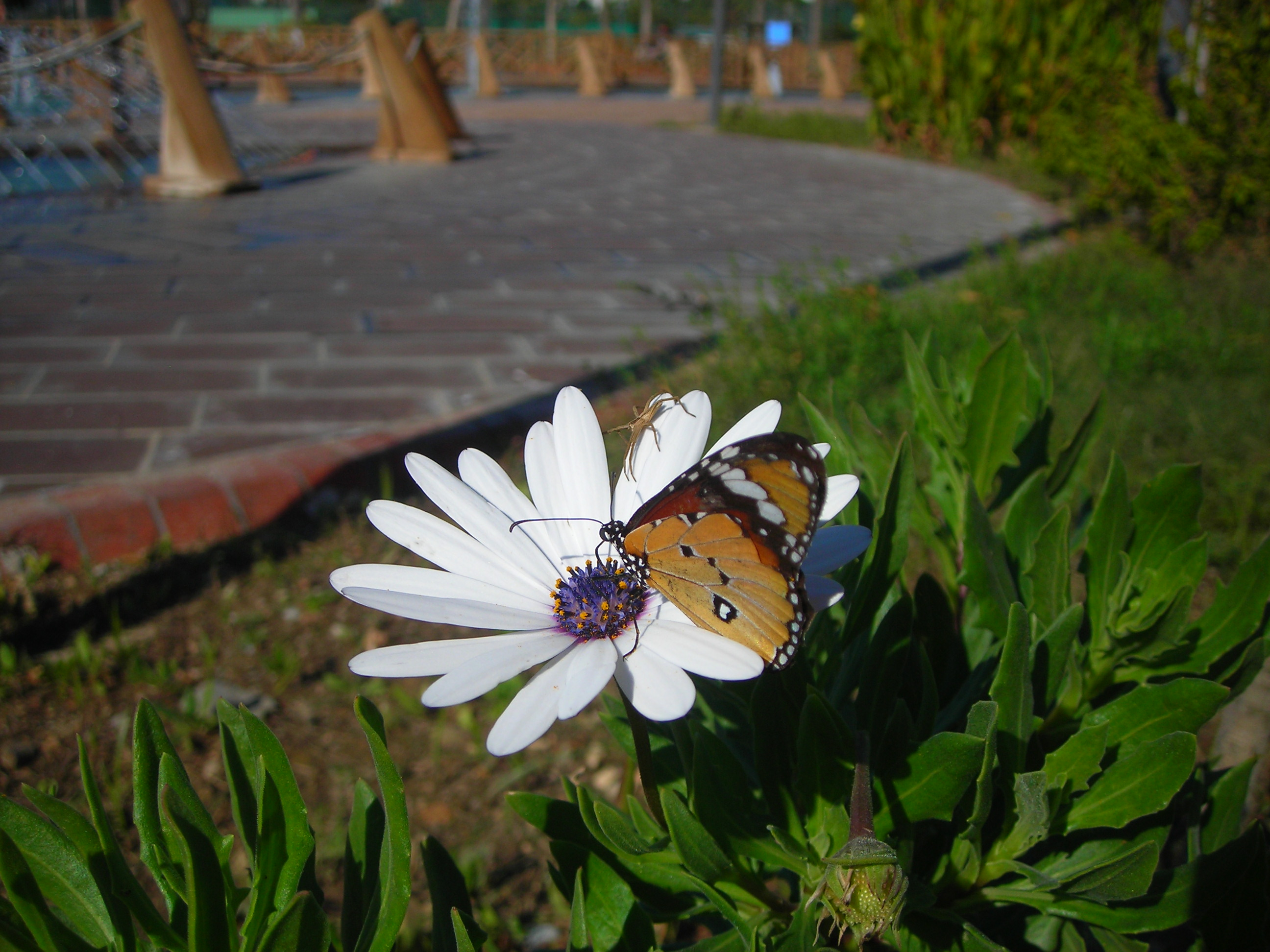 Türkçe